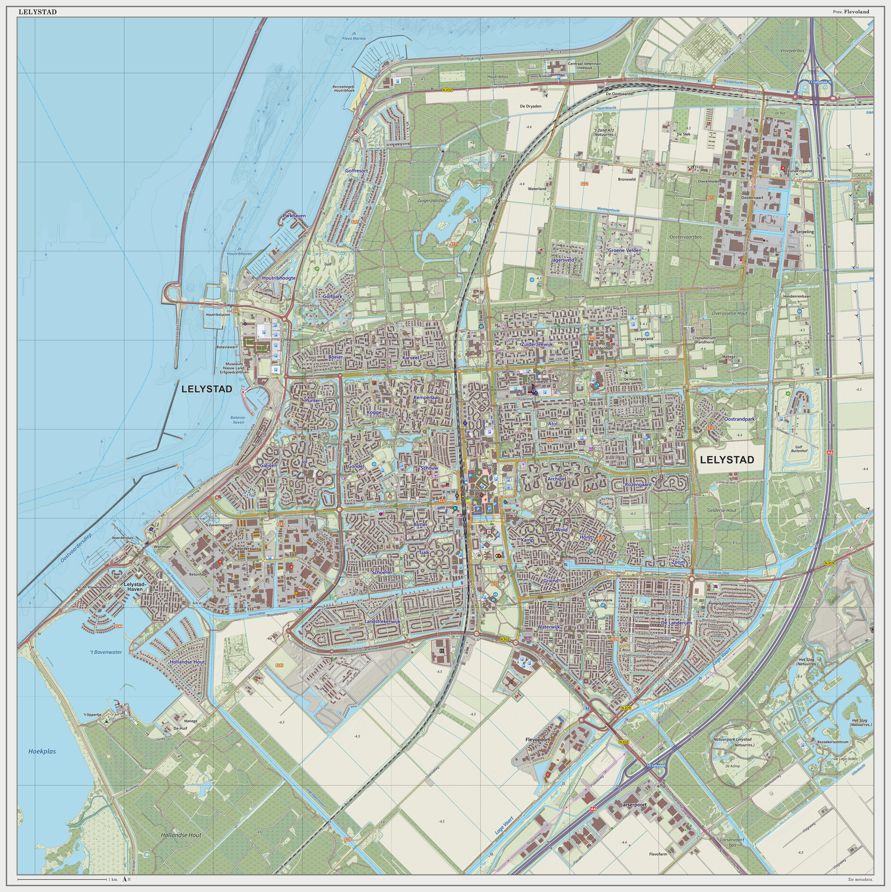 Topografische kaart van Lelystad (woonplaats). Resolutie: 300 pixels/km. Kaartbeeld samengesteld uit de open geodata van de Top10NL en Top25namen (Basisregistratie Topografie, Kadaster), Creative Commons BY licentie. Gebouwvlakken uit open geodata BAG extract. Wegen uit de OpenStreetMap. Reliëfschaduw uit de Actuele Hoogtekaart AHN2. Samenstelling en kleurenschema: Jan-Willem van Aalst, met QGIS2. Zie ook de Legenda.